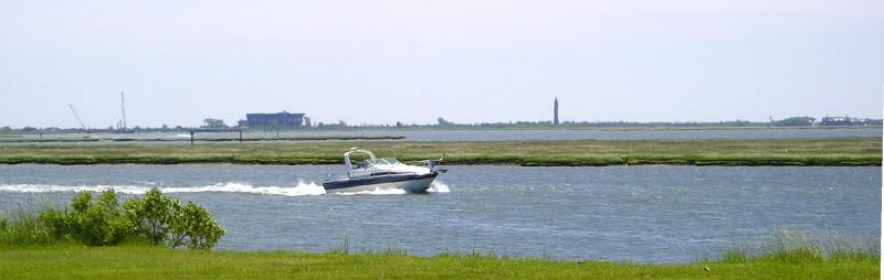 Wantagh Park